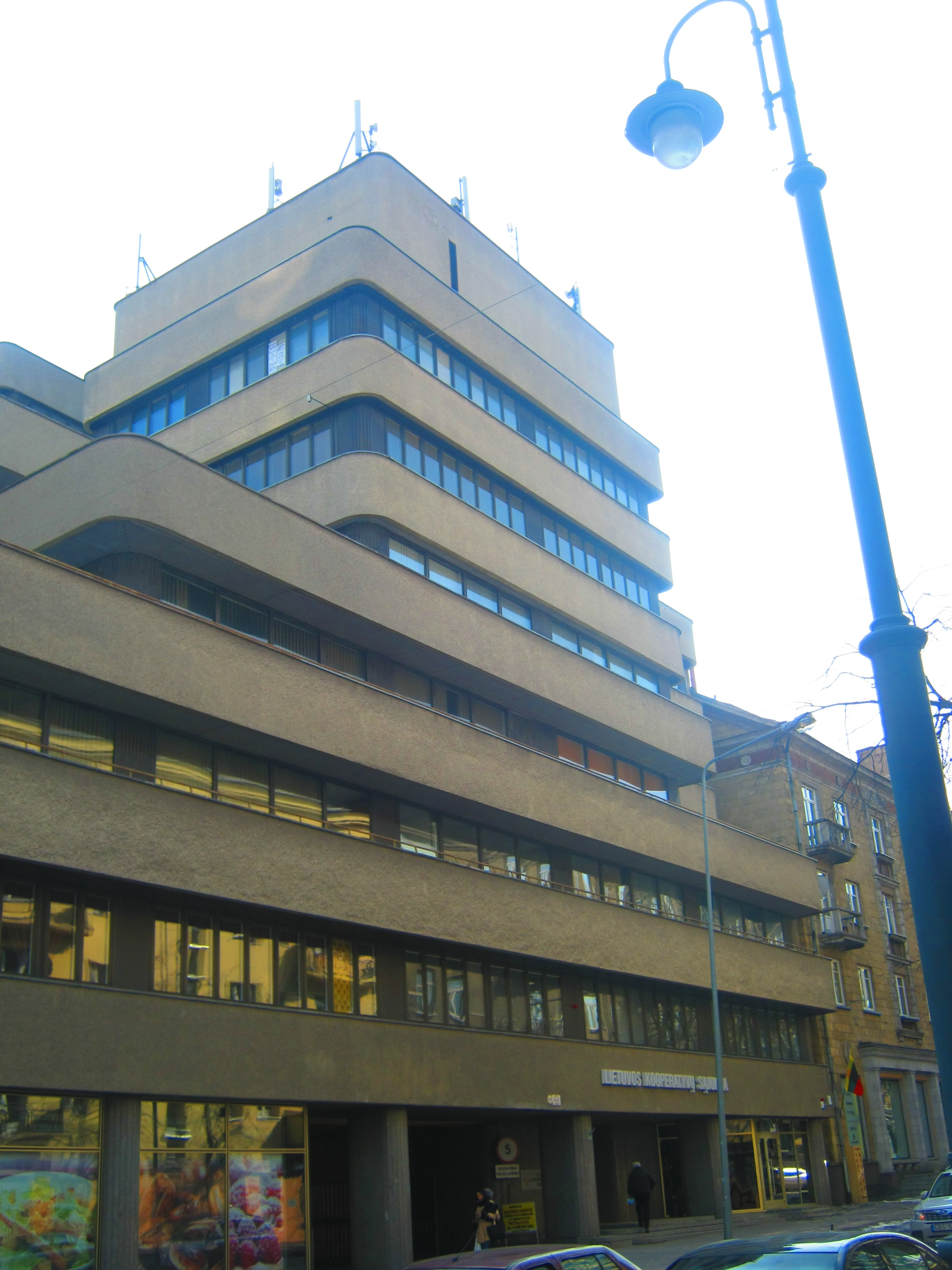 Lietuvos kooperatyvų sąjunga